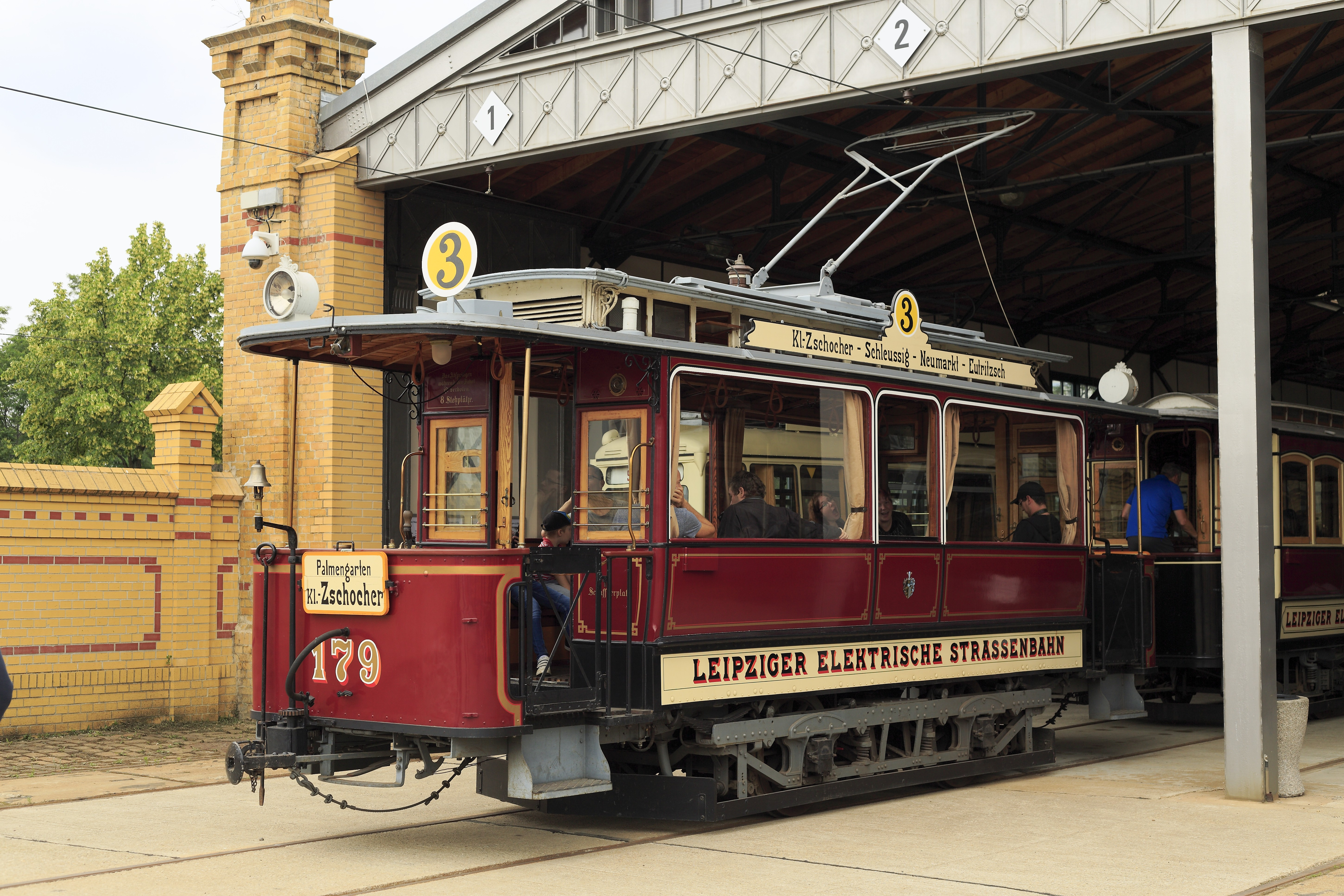 LESt-Salonwagen Typ 15, gebaut 1900 als zweite Bauart dieses Unternehmens. Die Fensterteilung lang-kurz-lang war seinerzeit Mode, die Große Leipziger Straßenbahn beschaffte mit den Wagen des Typs 13 sehr ähnliche Fahrzeuge. Der Achsstand der LESt-Wagen war mit 2000 Millimetern schon 200 mm länger als der der GLST-Wagen mit »Union«-Laufgestellen. Die Druckluftbremse wurde in die LESt-Wagen erst nach der Vereinigung der beiden Betriebe eingebaut. Ihre Beibehaltung im Museumsbestand ist ein für den Betriebseinsatz ebenso notwendiger Kompromiss wie die Nutzung einer gemeinsamen Kupplungsbauart (mit Kuppeleisen mit rechteckigem Querschnitt nach LESt-Normen).